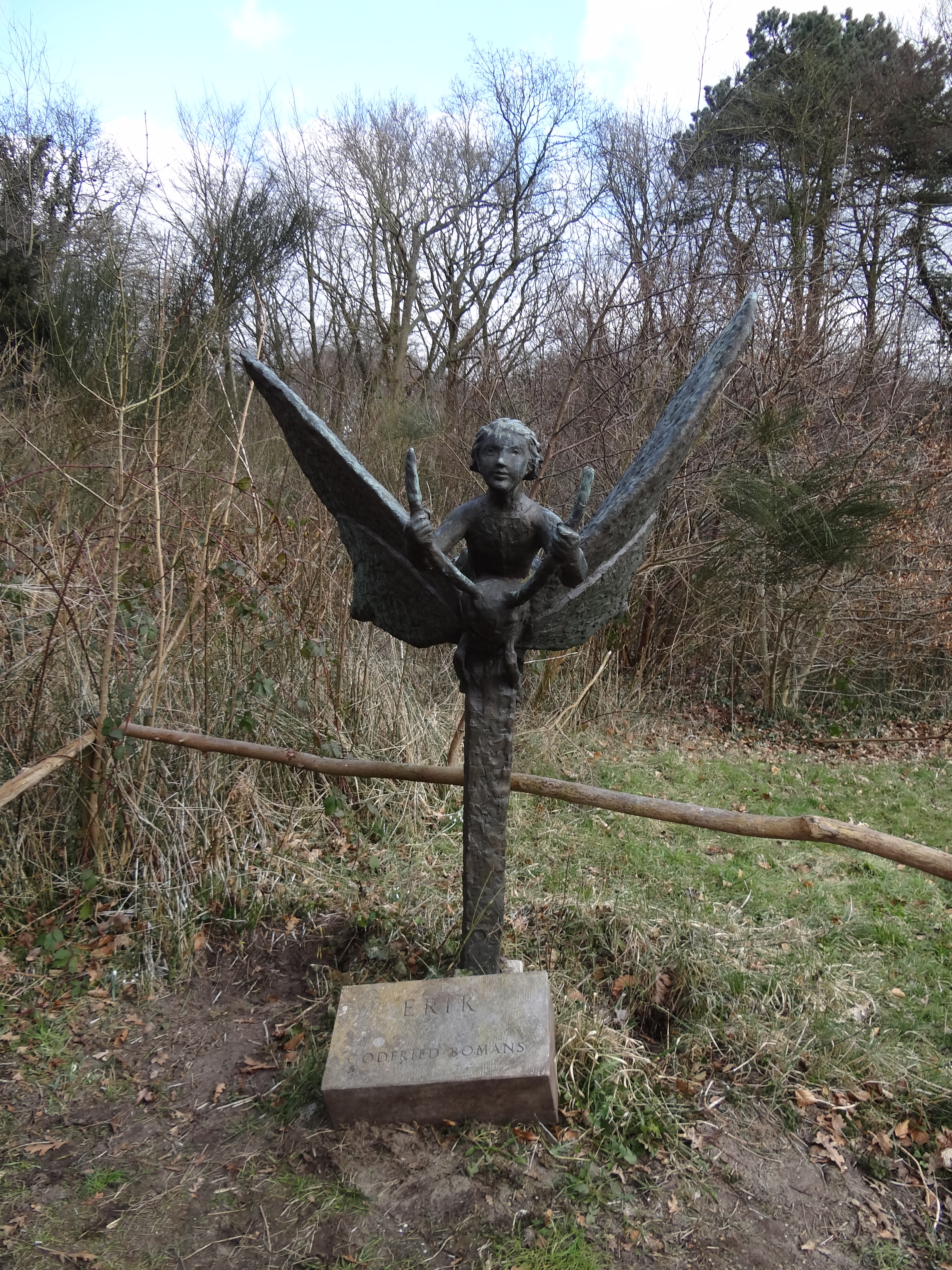 beeld Erik de Vlinder